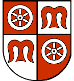 Dieses Wappen ist auf der offiziellen Seite der Stadt Miltenberg abgebildet (04.06.2006)